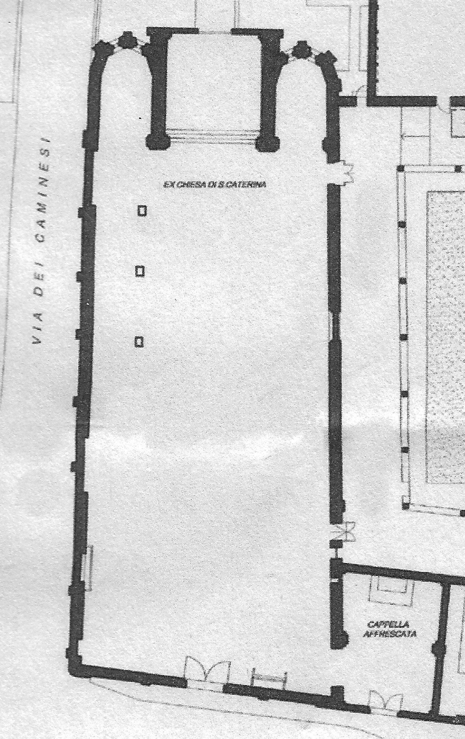 Planimetria dell'ex-chiesa di Santa Caterina a Treviso, ricavata da una mappa di fine Ottocento